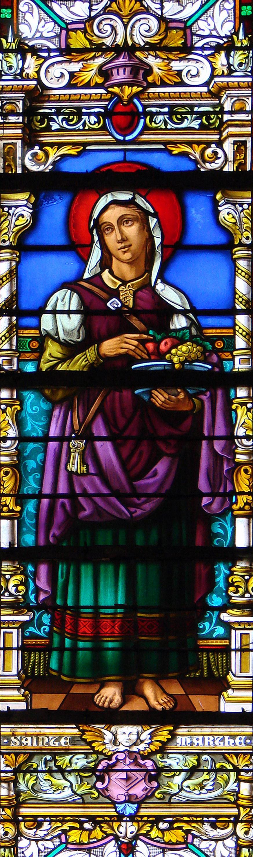 Vitrail représentant Sainte Marthe, dans l'église abbatiale Saint-Michel à Saint-Mihiel.